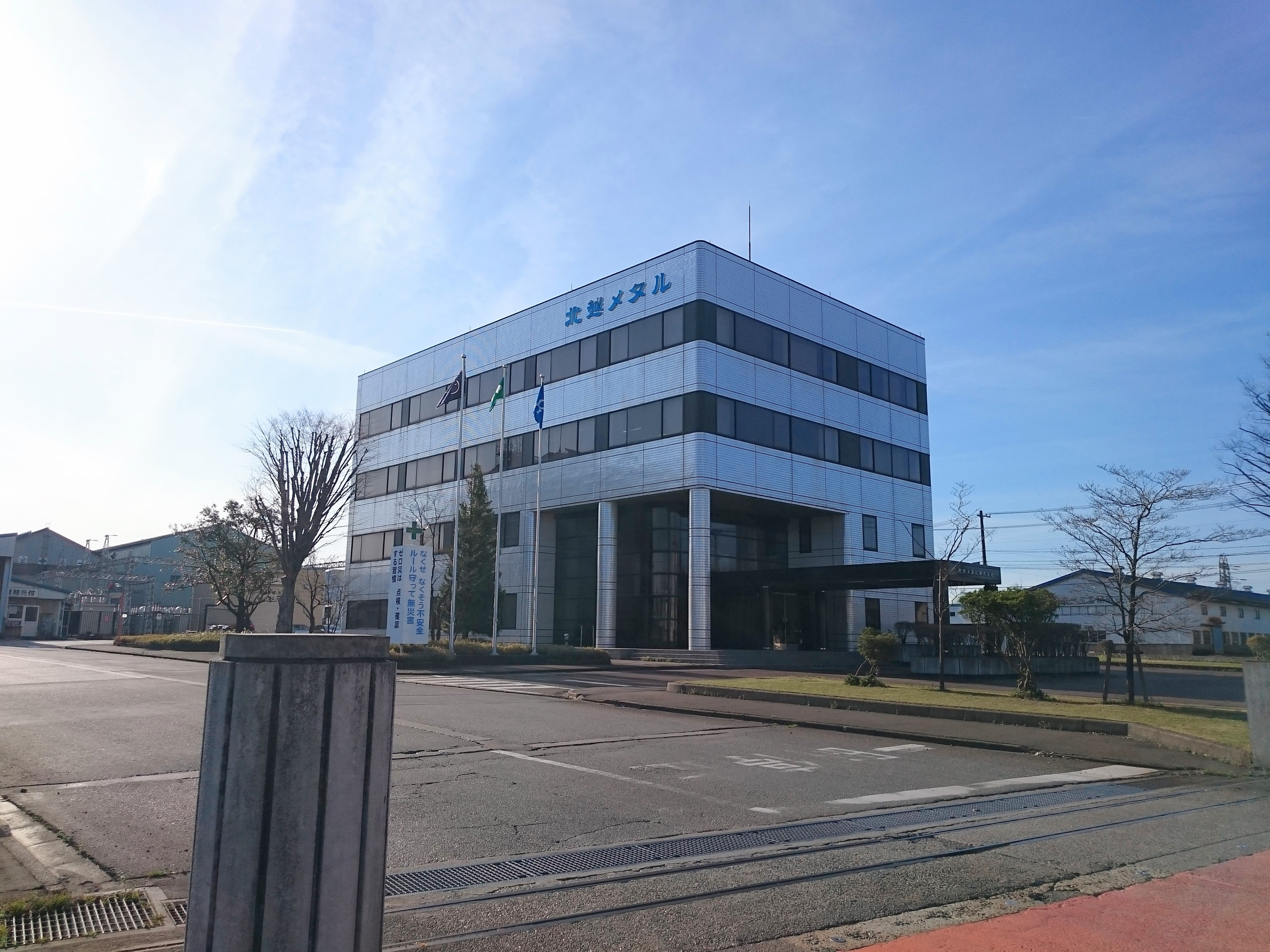 北越メタル株式会社の本社外観